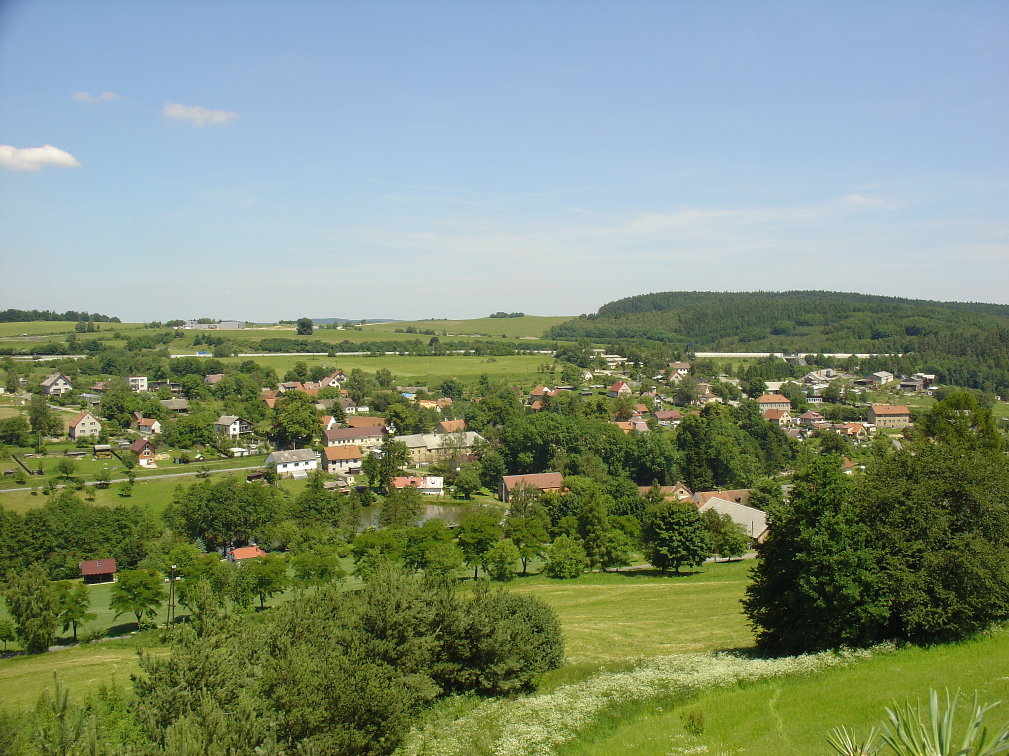 Česky: Obec Ostředek